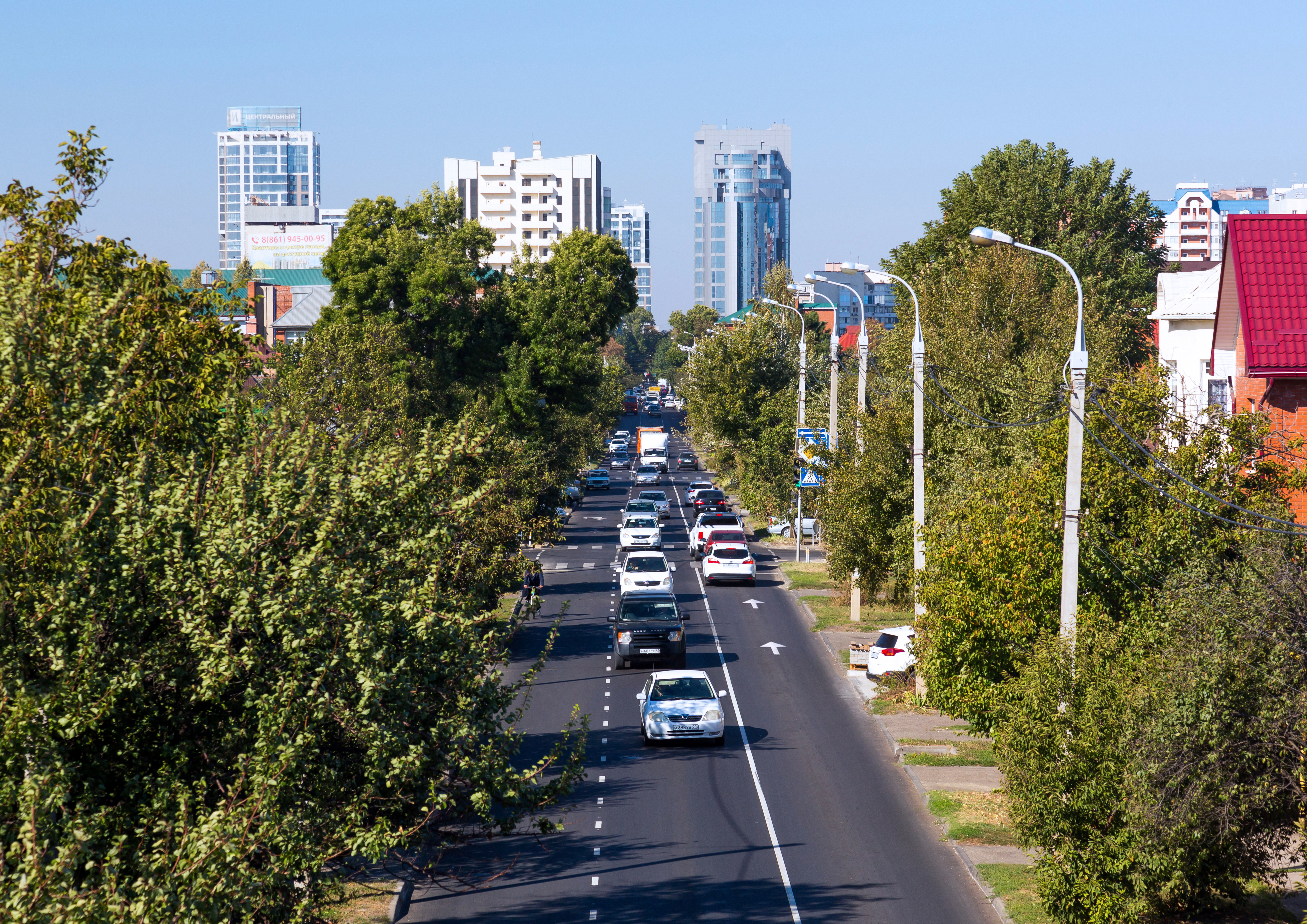 Кузнечная улица в г. Краснодаре